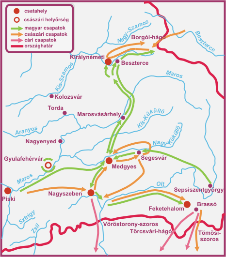 Bem erdélyi hadműveleteinek második szakasza (a piski csatától Brassó elfoglalásáig)